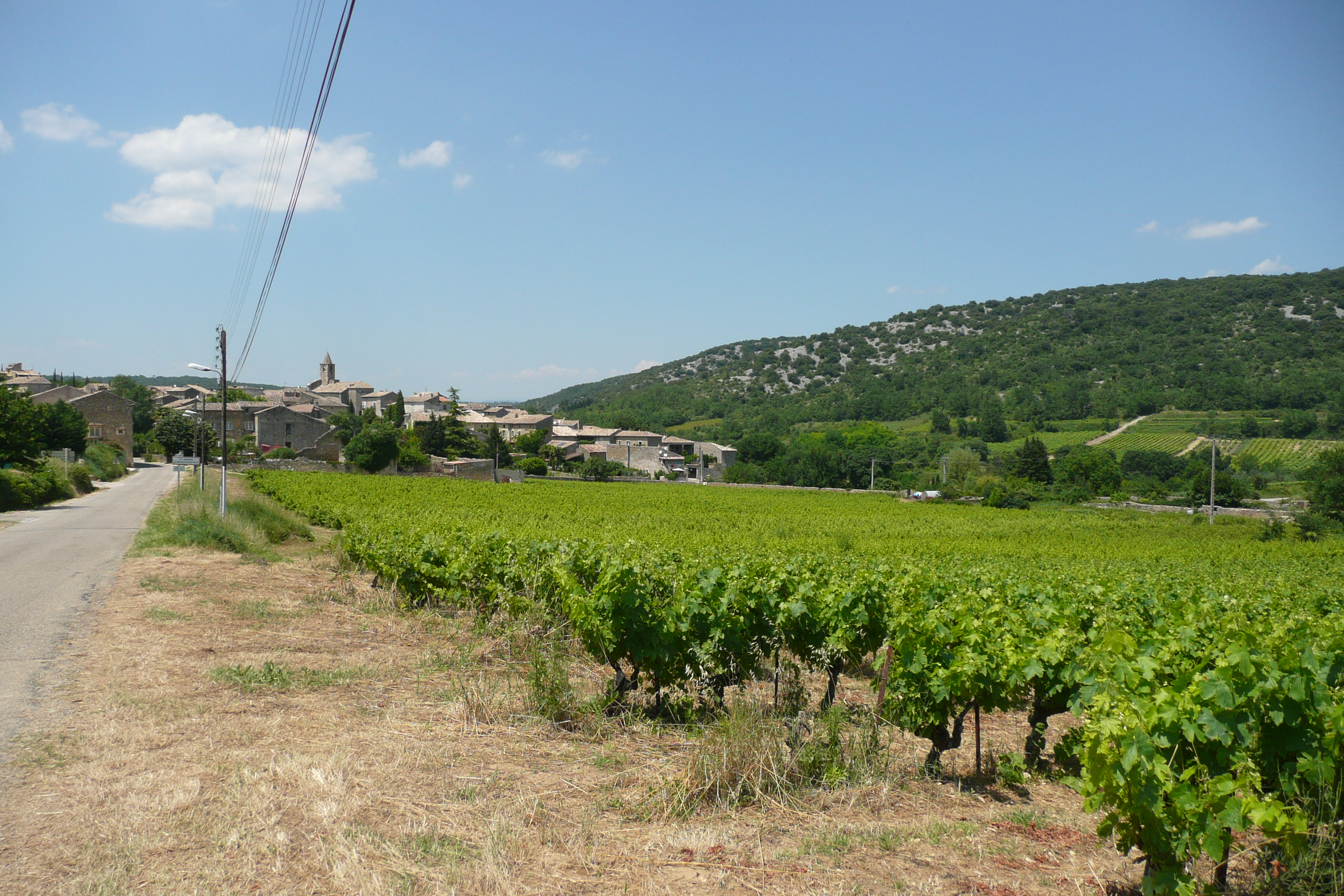 Vue d'ensemble de Saint-André-de-Roquepertuis.